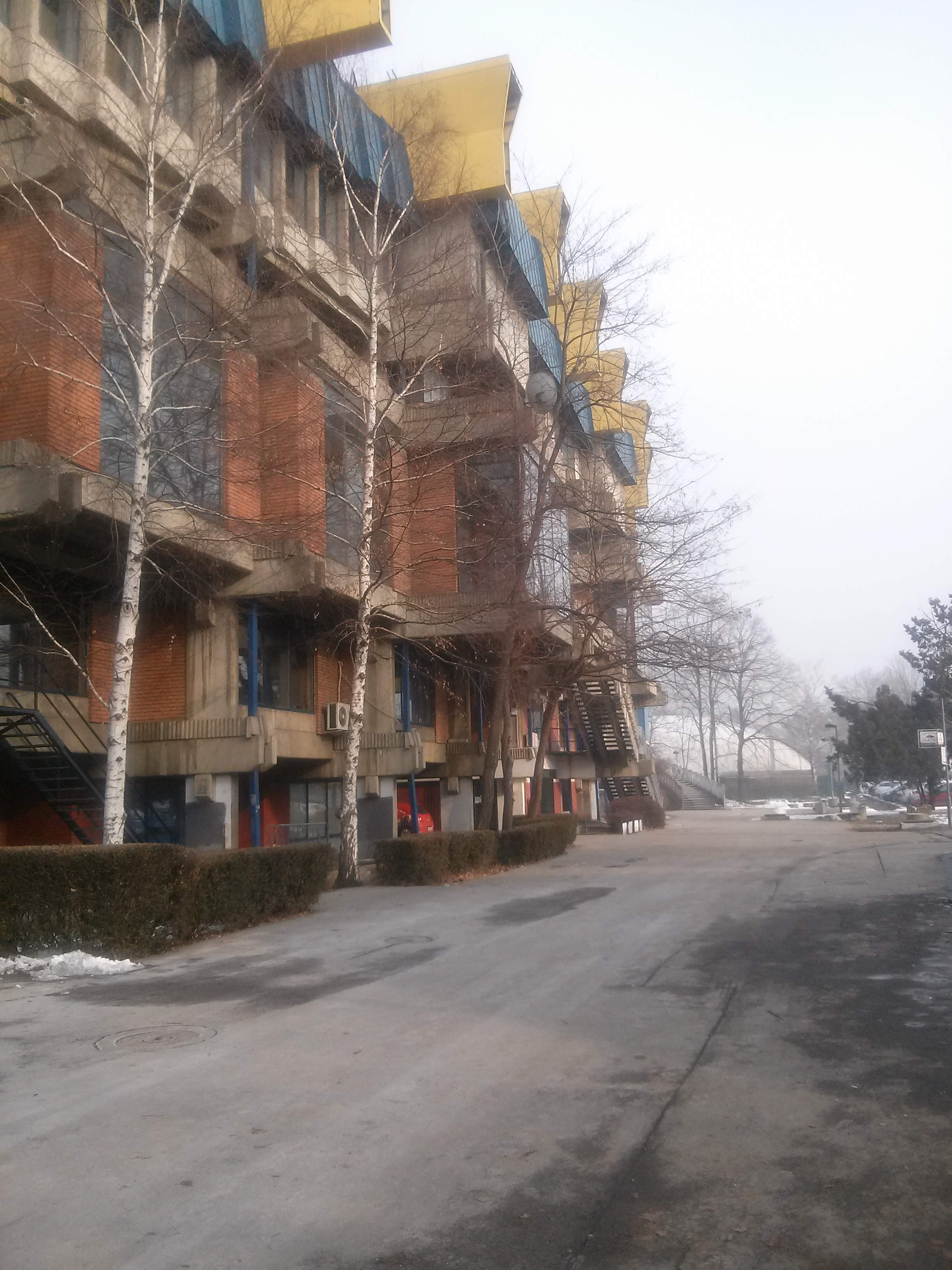 Srpski (latinica): Hala Aleksandar Nikolić